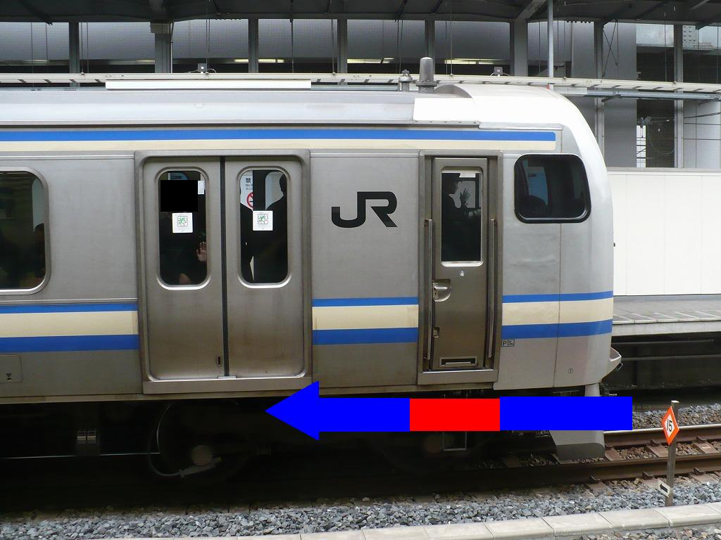 JRE217形電車機器